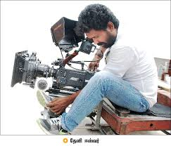 theni eswar